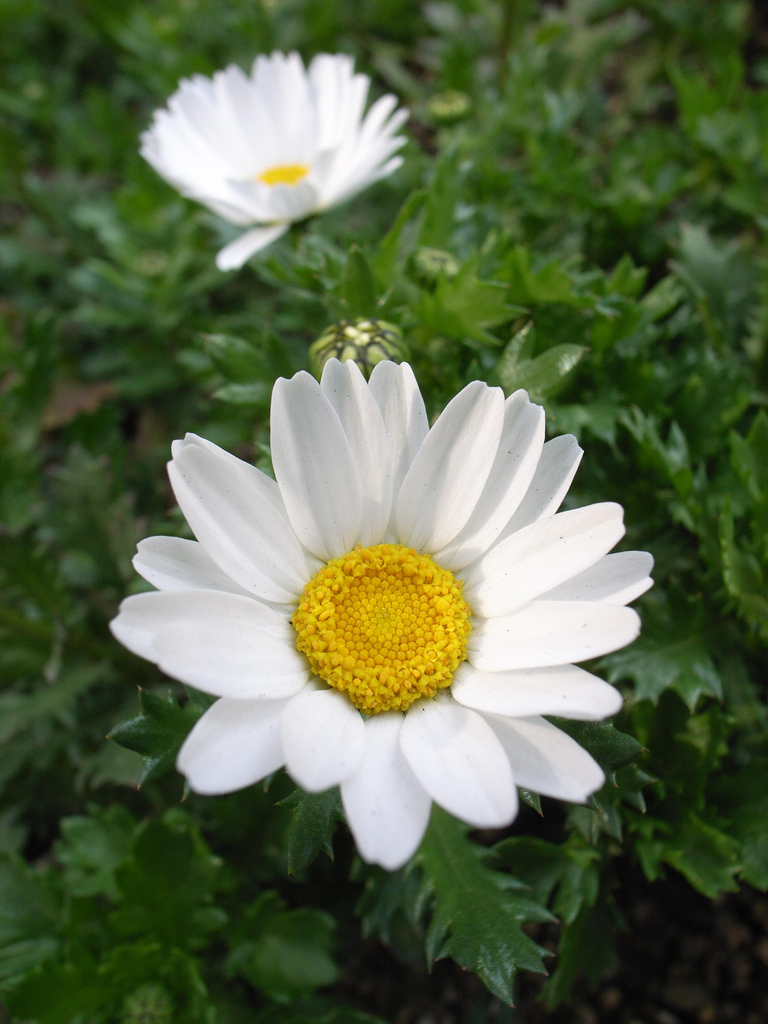 Mauranthemum paludosum